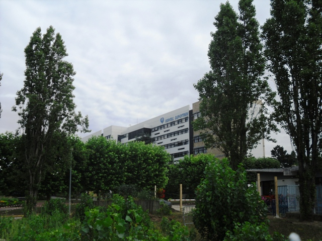 L'hôpital Joffre-Dupuytren (AP-HP) de Draveil (91)